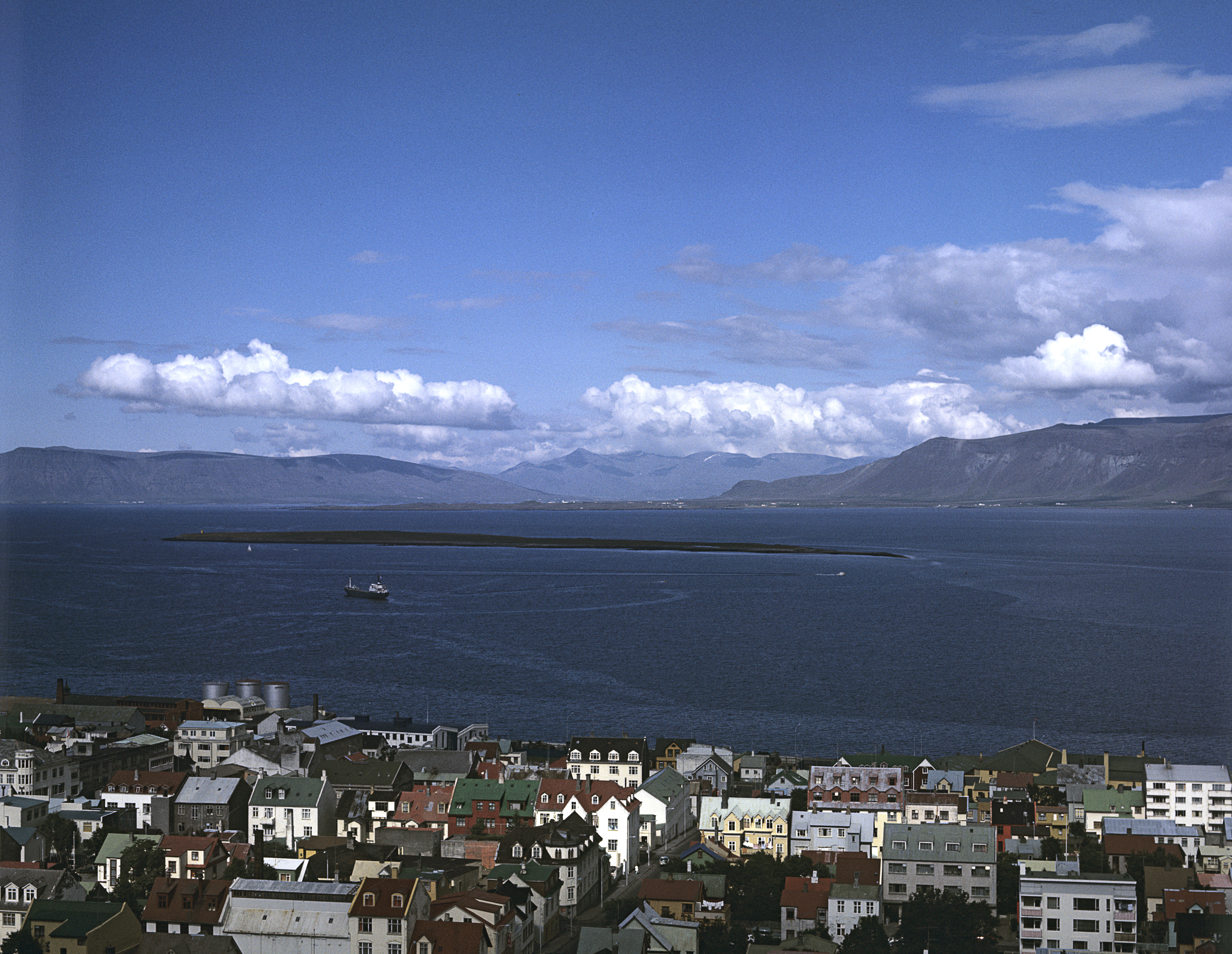 Reykjavík von der Hallgrímskirkja aus. Im Hintergrund der Eingang zum Hvalfjörður. Dazwischen die Insel Engey.